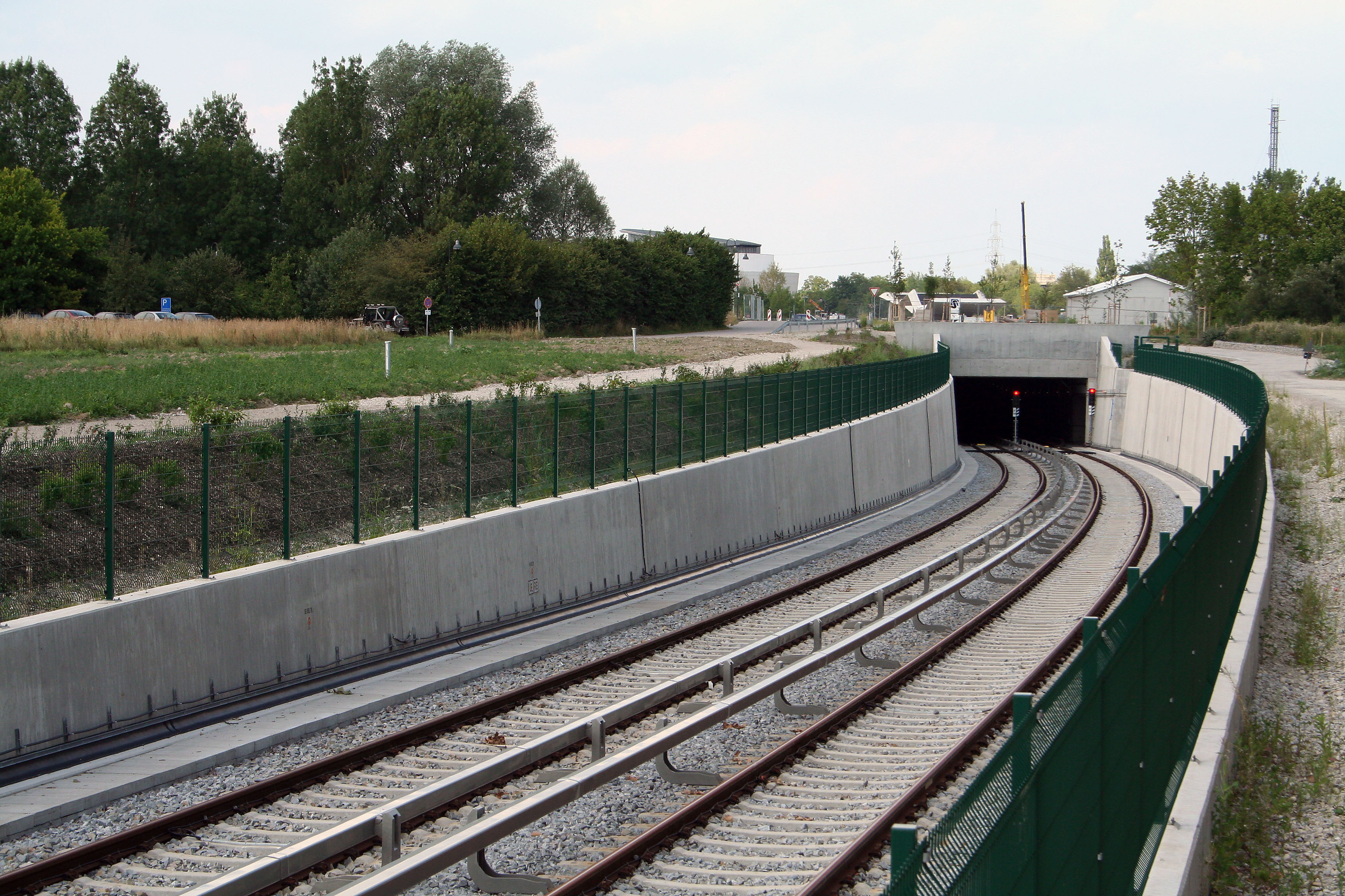 Tunneleinfahrt der Linie U6 zum Forschungsgelände Garching.